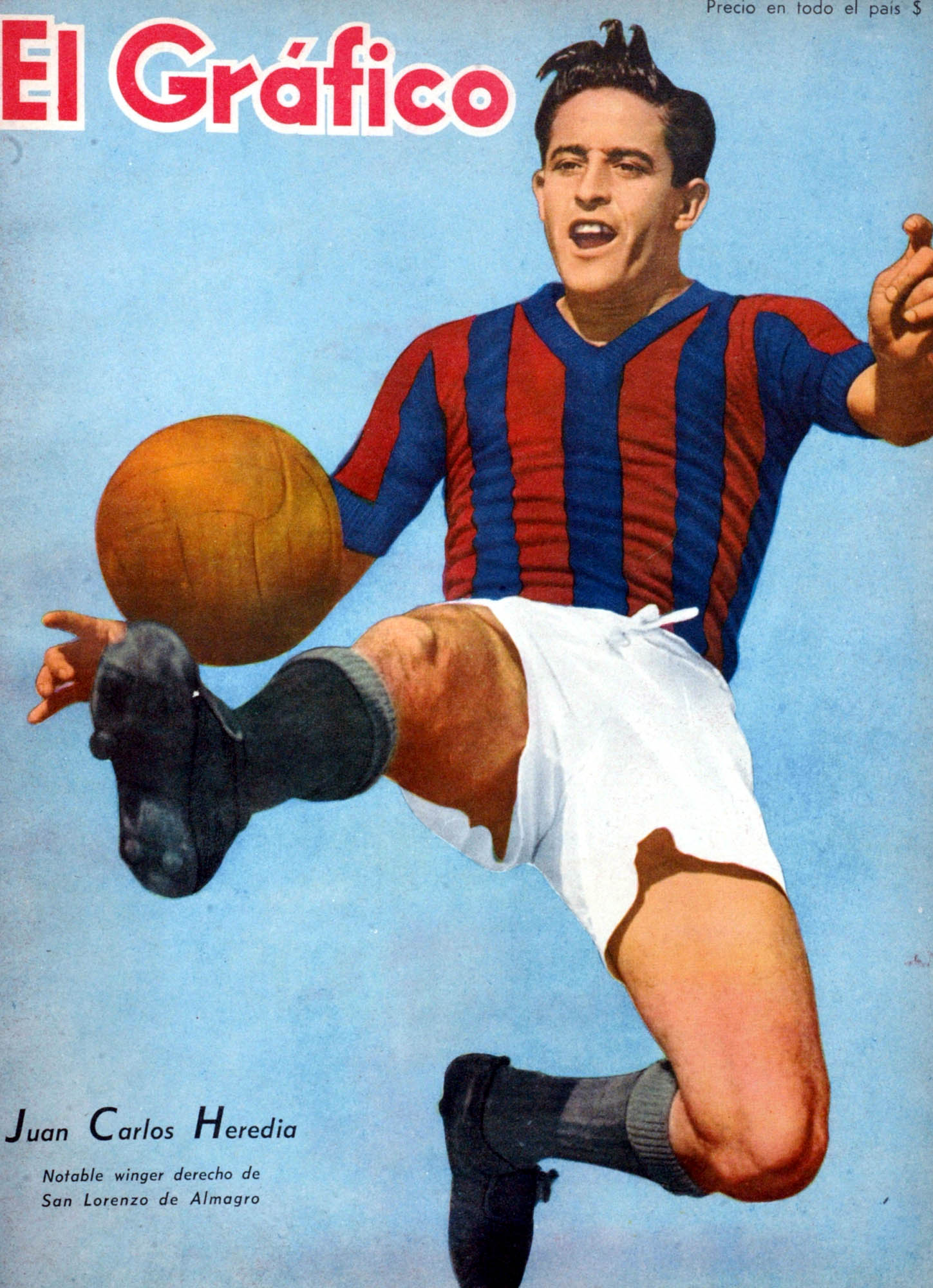 El Grafico del 07 de Mayo de 1943. Edicion 1243